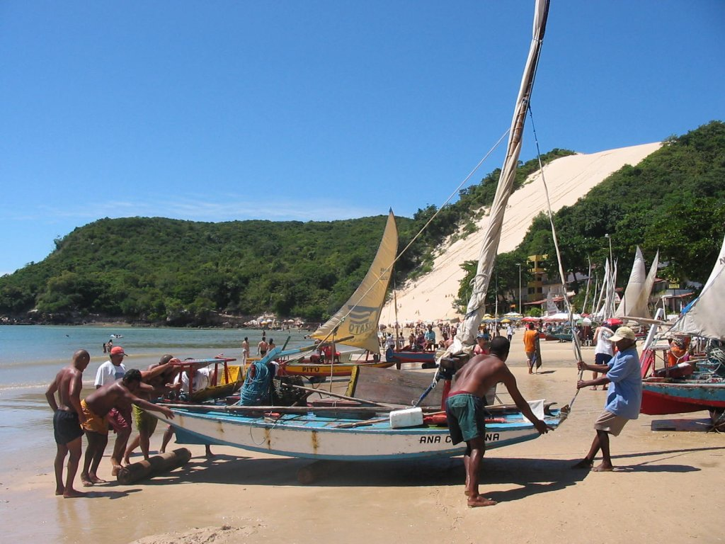 Morro do Careca na Praia de Ponta Negra em Natal, Rio Grande do Norte, Brasil. Morro do Careca (Bald Hill) spot in the Ponta Negra Beach in Natal, Rio Grande do Norte, Brazil.